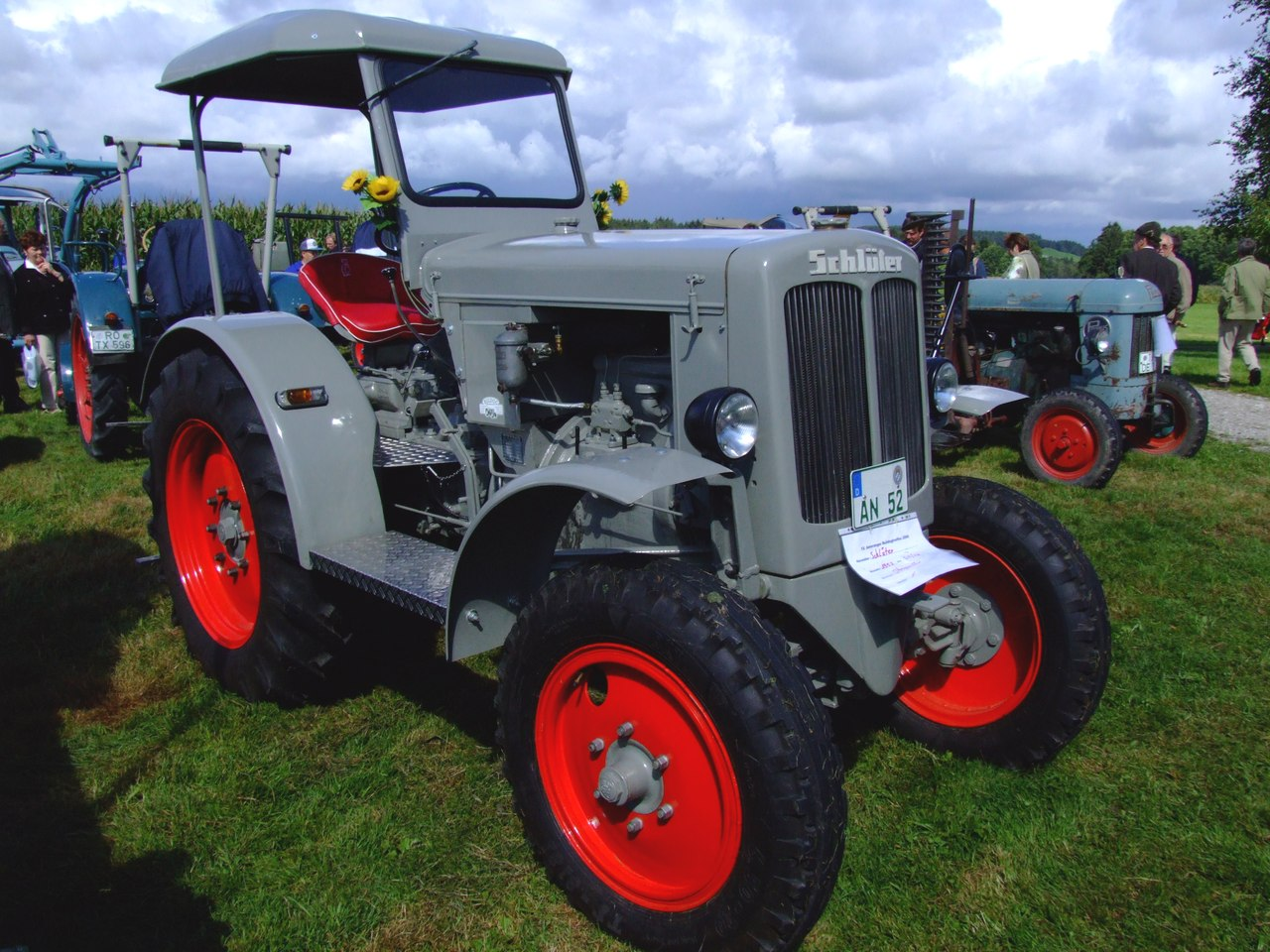 Schlüter DS25B mit 25-28 PS, Baujahr 1952, Drehzahl: 1500, Hubraum: 3114 ccm, Gewicht: 1990 kg, zul. Achslast vorne: 950 kg, zul. Achslast hinten: 1550 kg